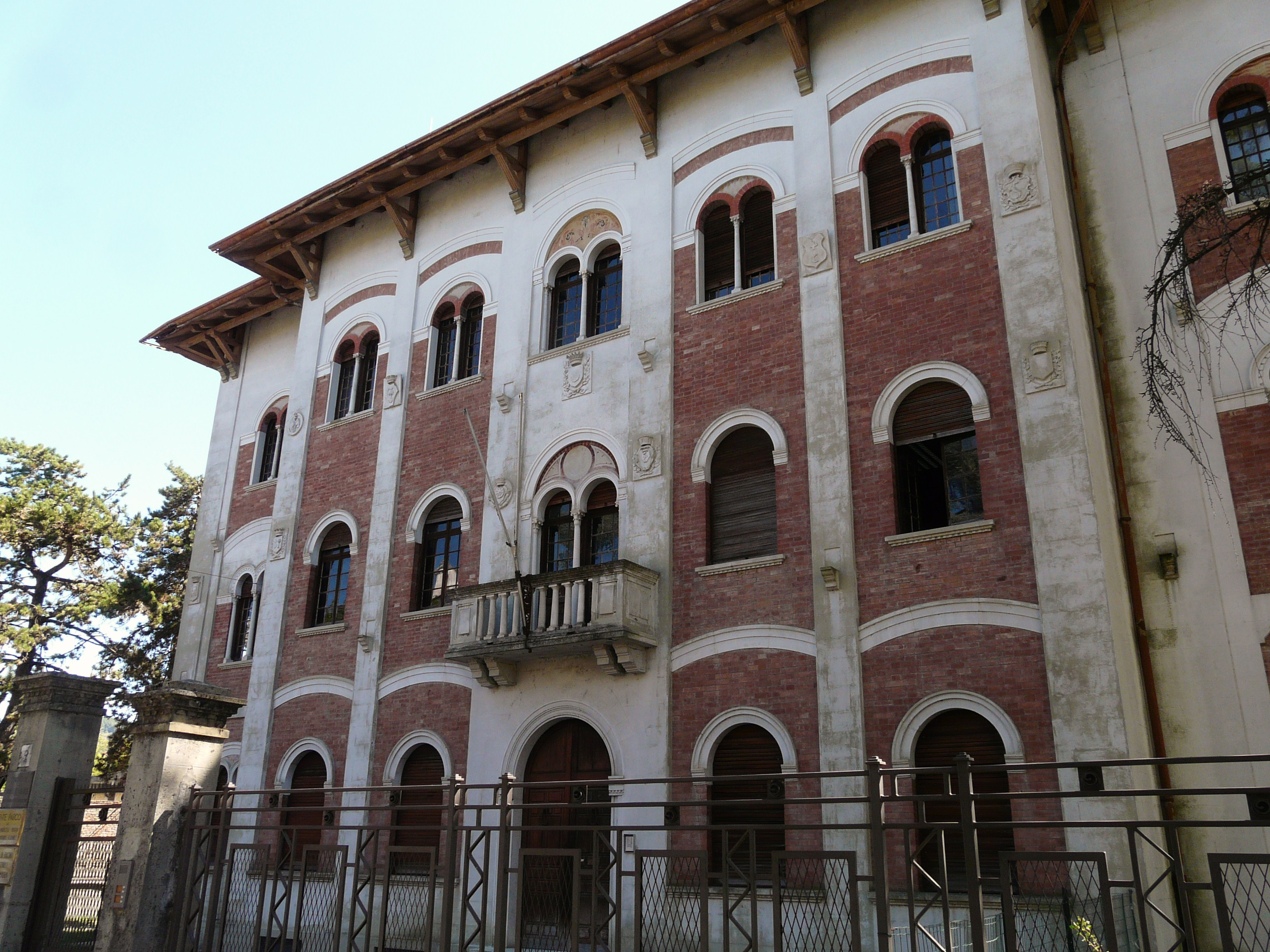 Sede dell'Ente Parco di Montemarcello Magra, Sarzana, Liguria, Italia